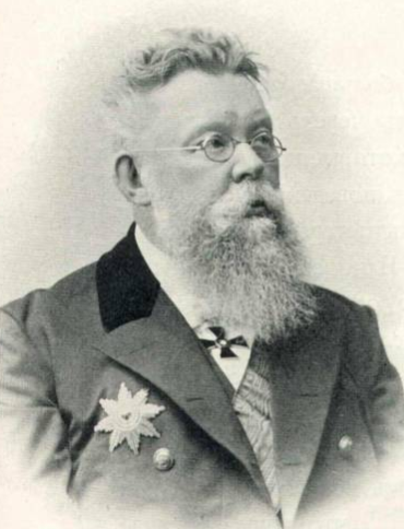 Константин Николаевич Козырев — действительный статский советник, один из покровителей любительской астрономии, директор Московского коммерческого училища, коллекционер гравюр (свыше 4000 листов — в 1913 году пожертвовал свою коллекцию Костромскому Романовскому музею).